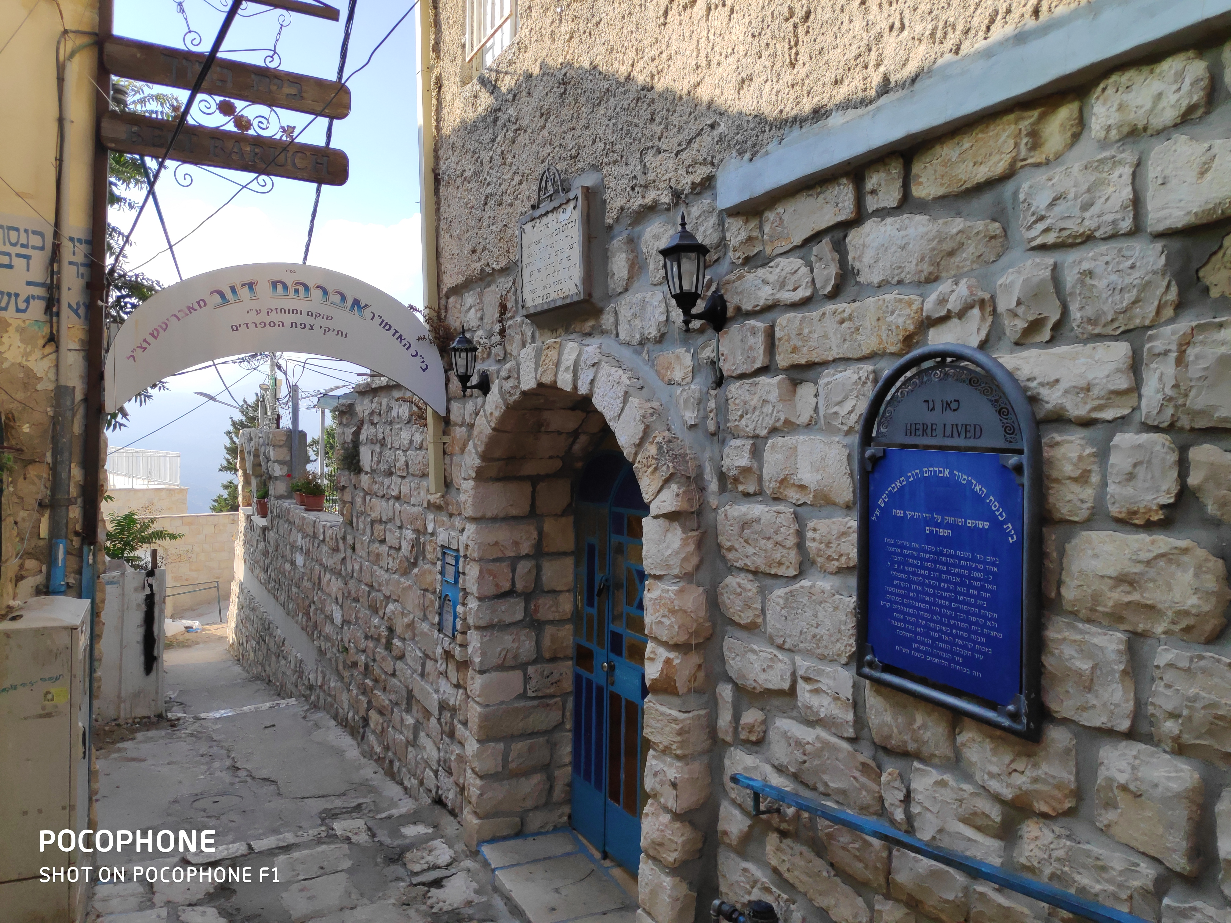 חזית בית הכנסת אבריטש